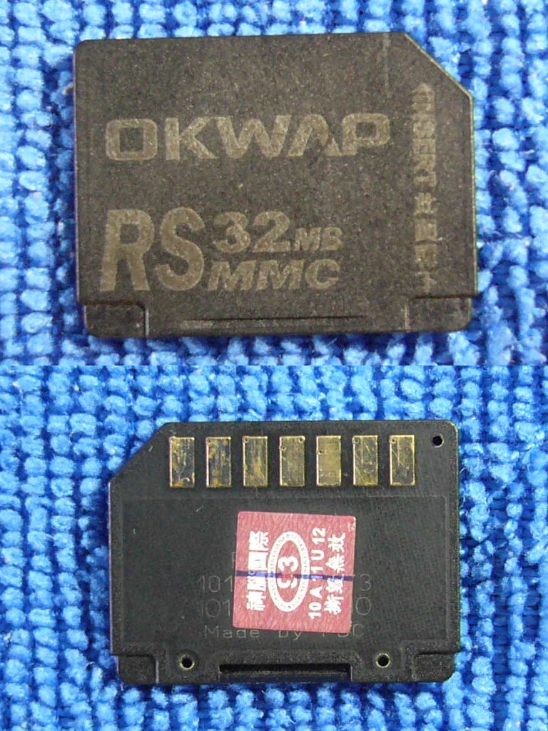 2004年OKWAP A363行動電話附贈的32MB RS-MMC卡，上為正面，下為背面。